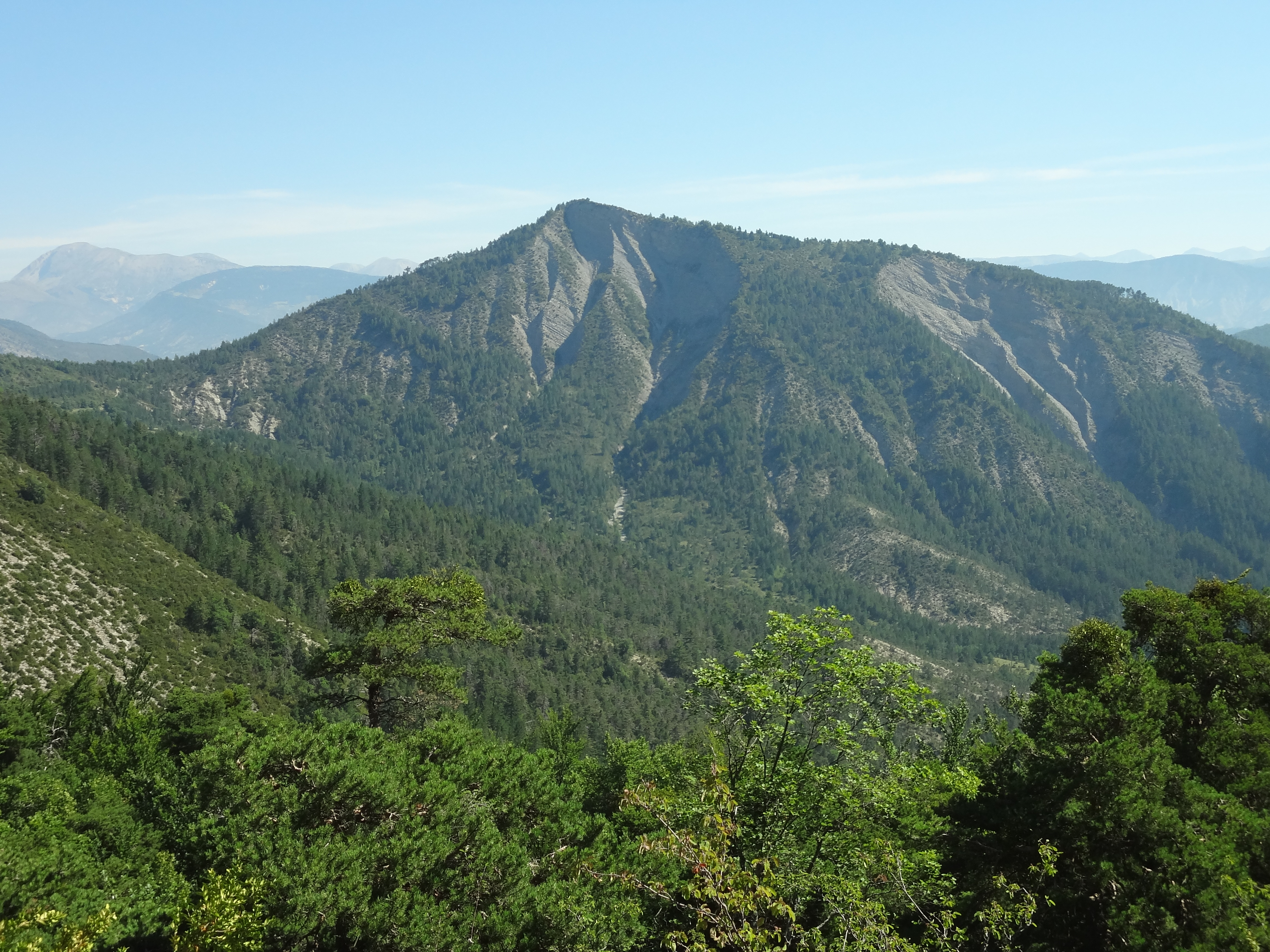 Téléchargée avec Commonist 0.9.1 Sommet de Tourap, 1240 m